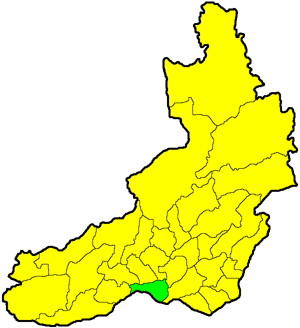 Ононский район на карте Забайкальского края